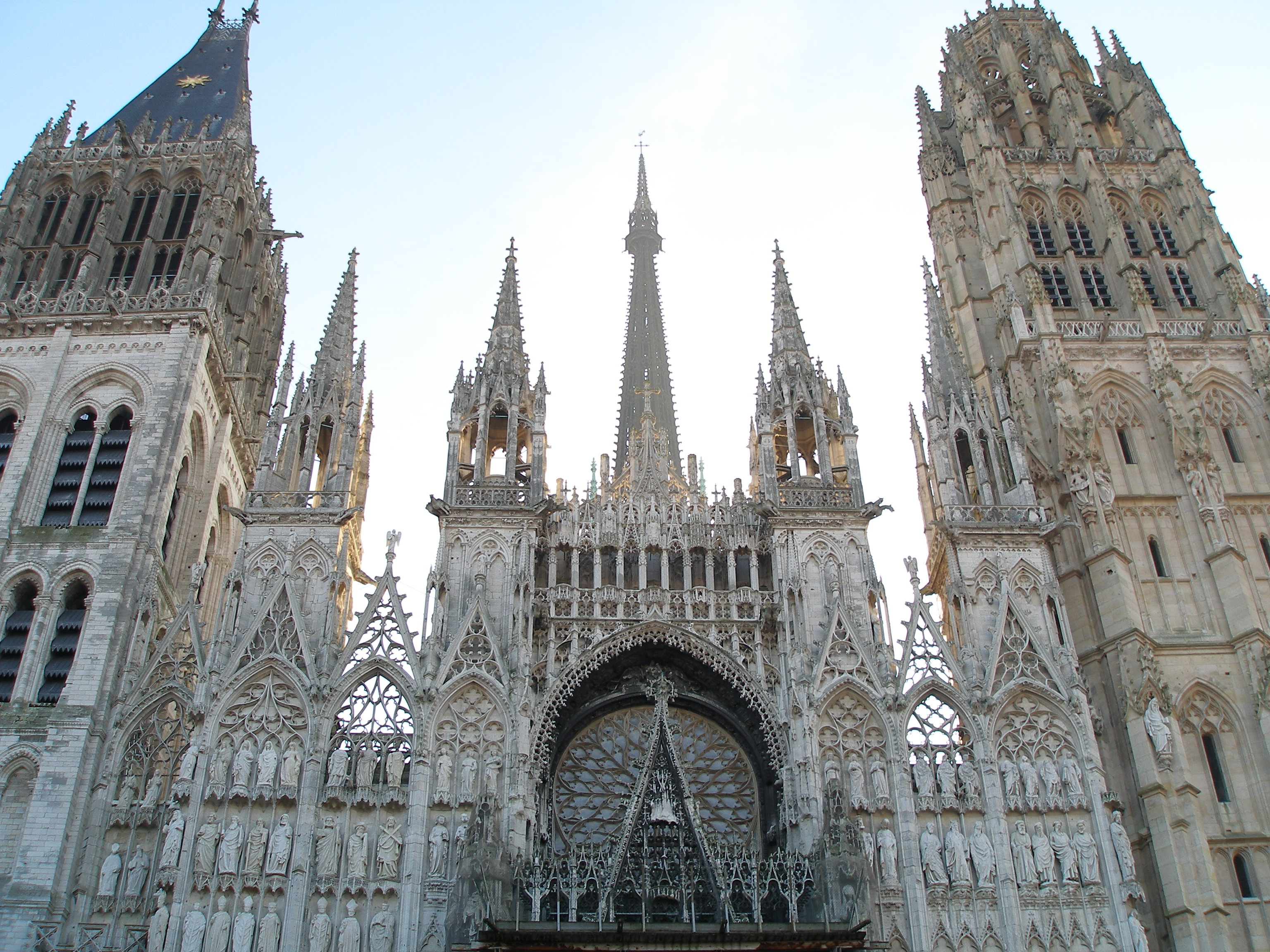 Facade ouest de la Cathédrale de Rouen au matin.